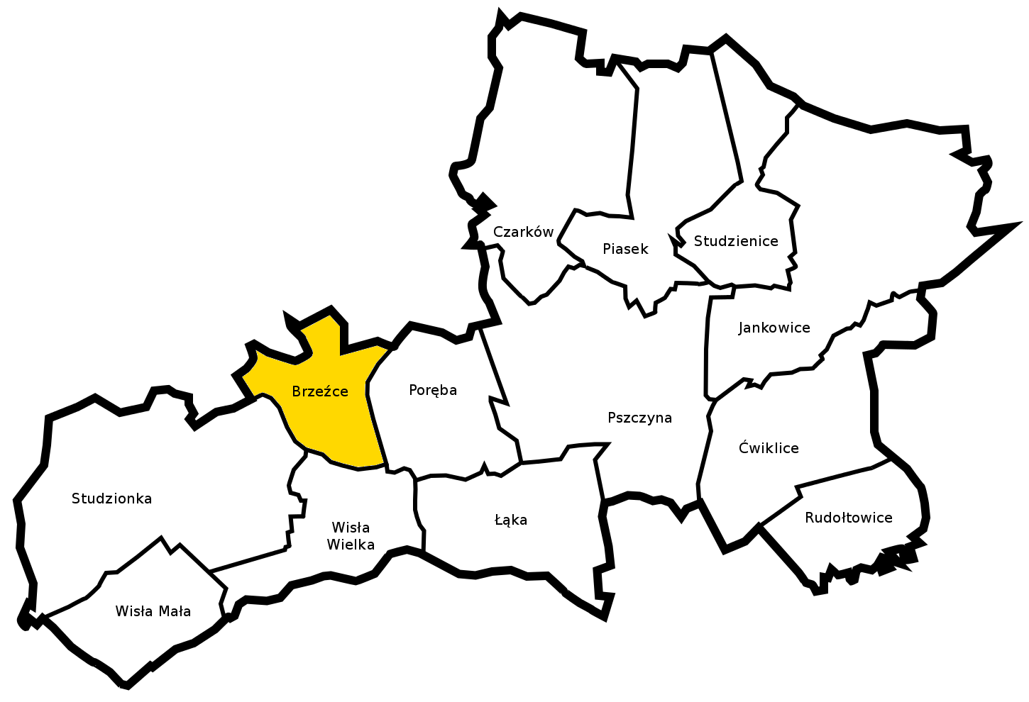 Gmina Pszczyna - sołectwo Brzeźce